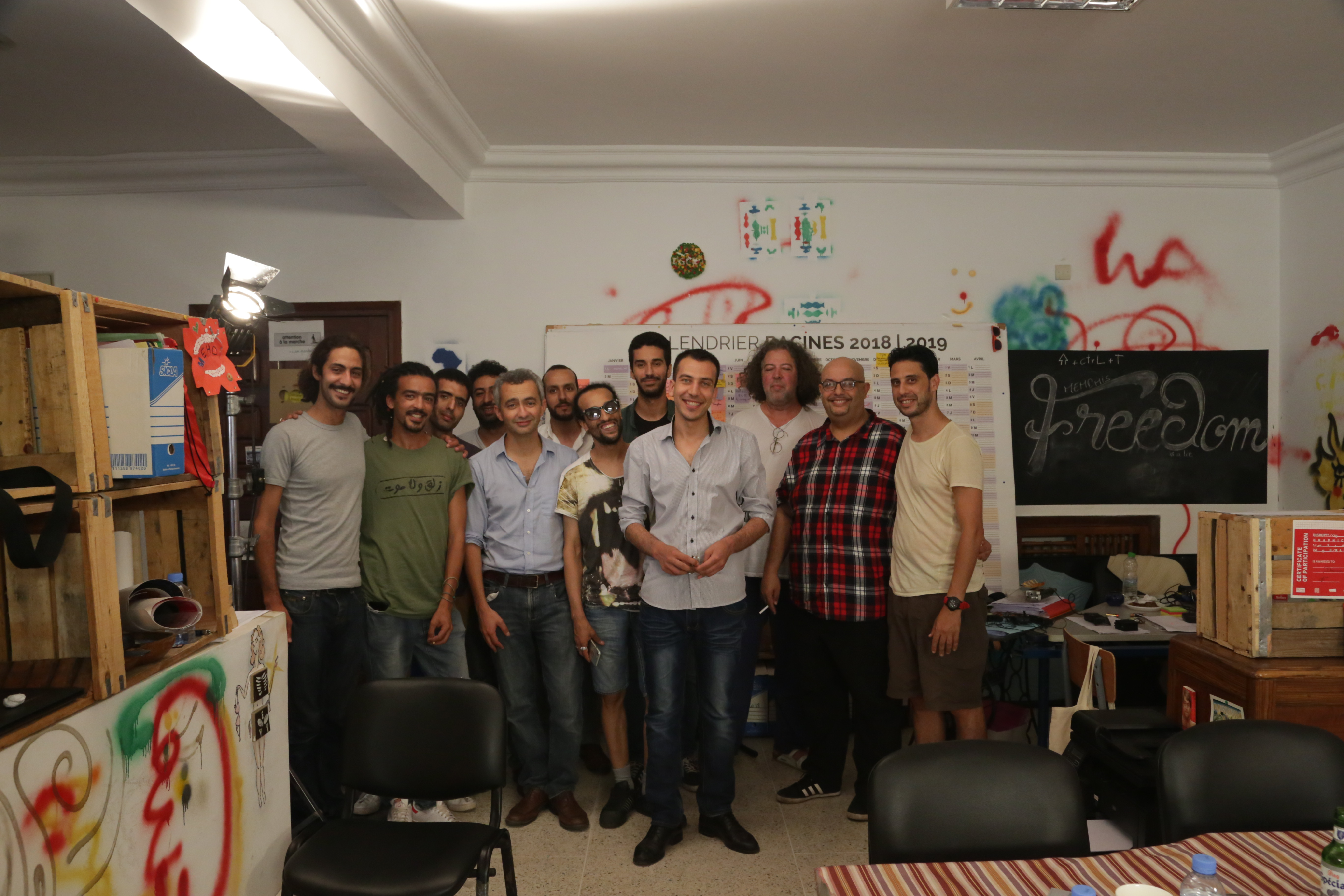 Photo de groupe après tournage de la 6ème émission de 1D2C.